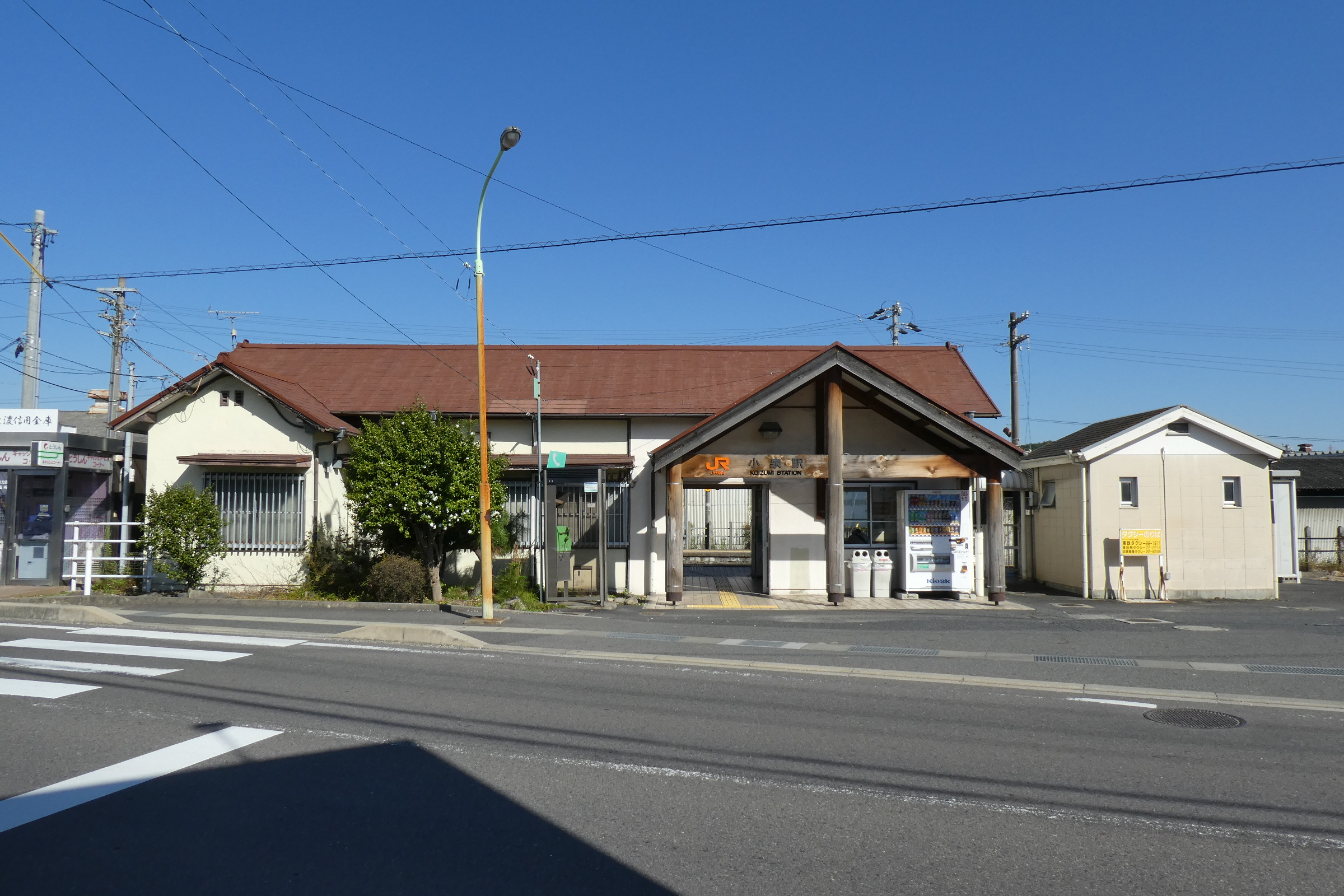 JR東海 太多線 小泉駅。